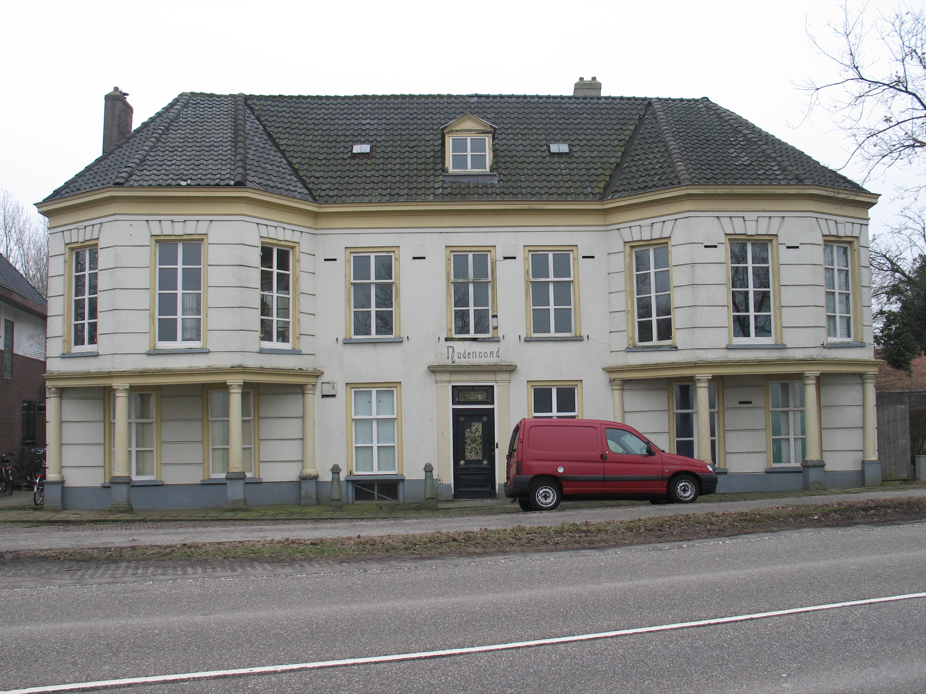 Lawickse Allee 71 Rijksmonumentnummer 38224